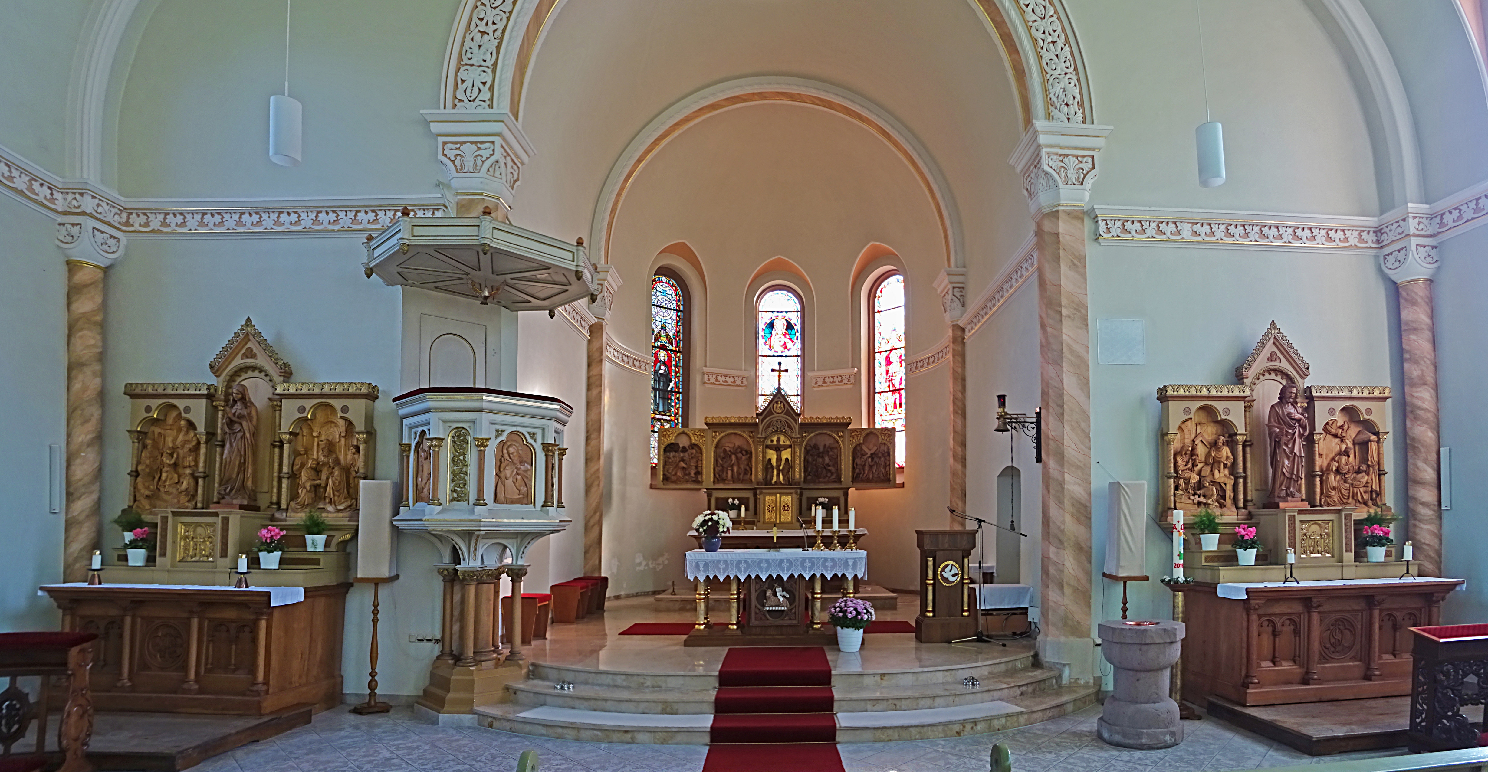 Altarraum der Dorfkirche St. Mauritius in Lutter (Eichsfeld)